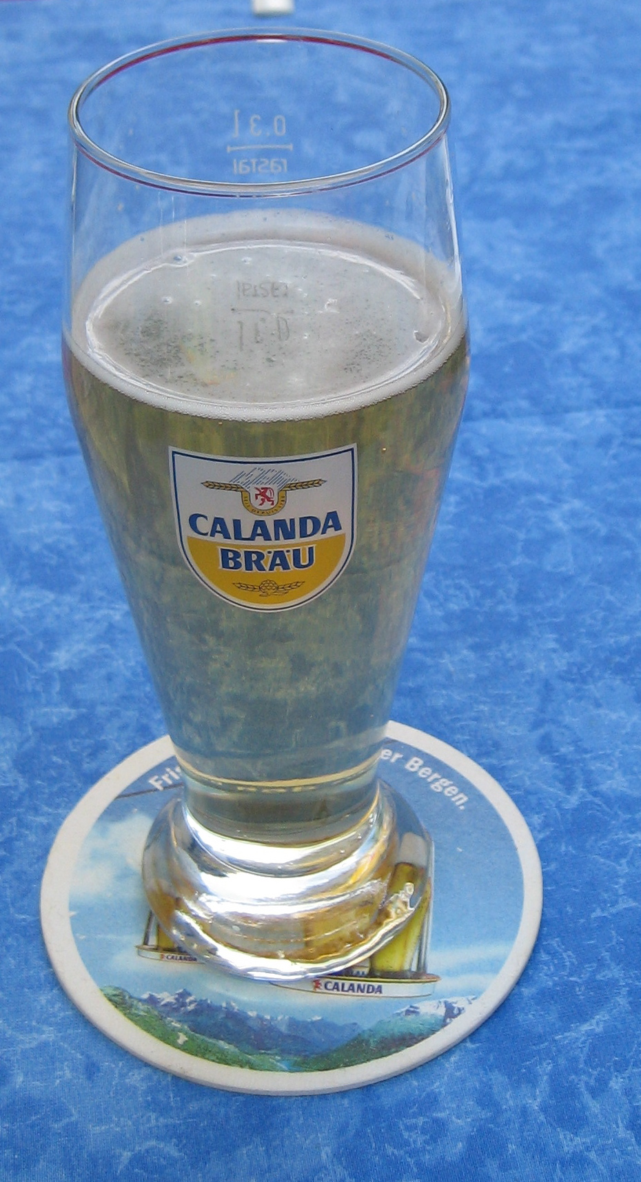 Glas Calanda Bier